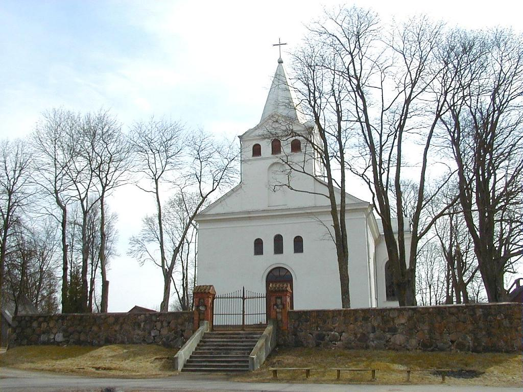 Jasmuižas Svētā Krusta pagodināšanas Romas katoļu baznīca 2001-04-08